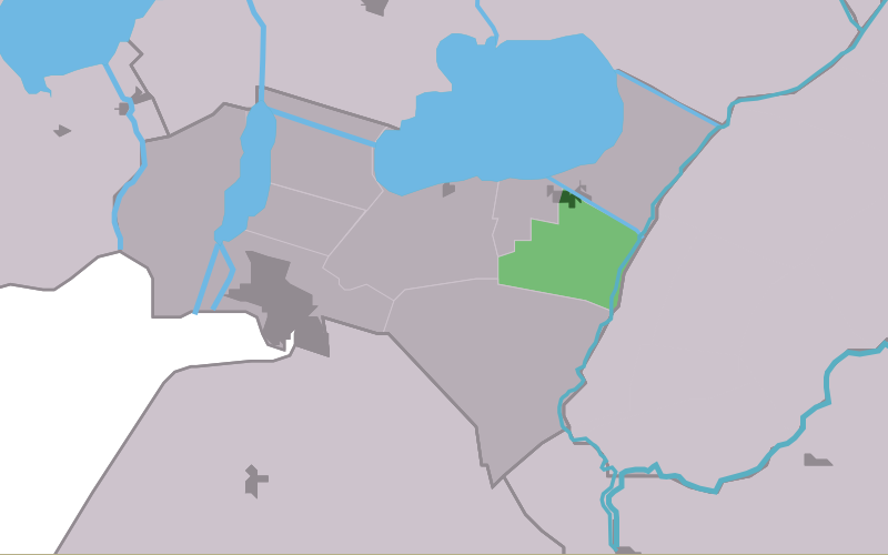 Kaartsje fan himrik fan Ychtenbrêge